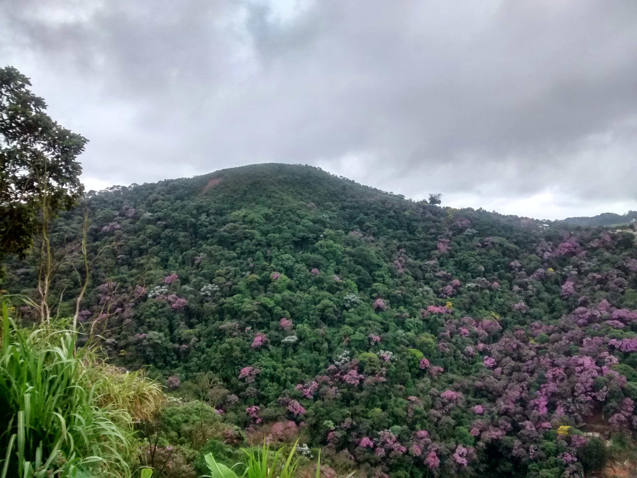 Fundão Zaira 4